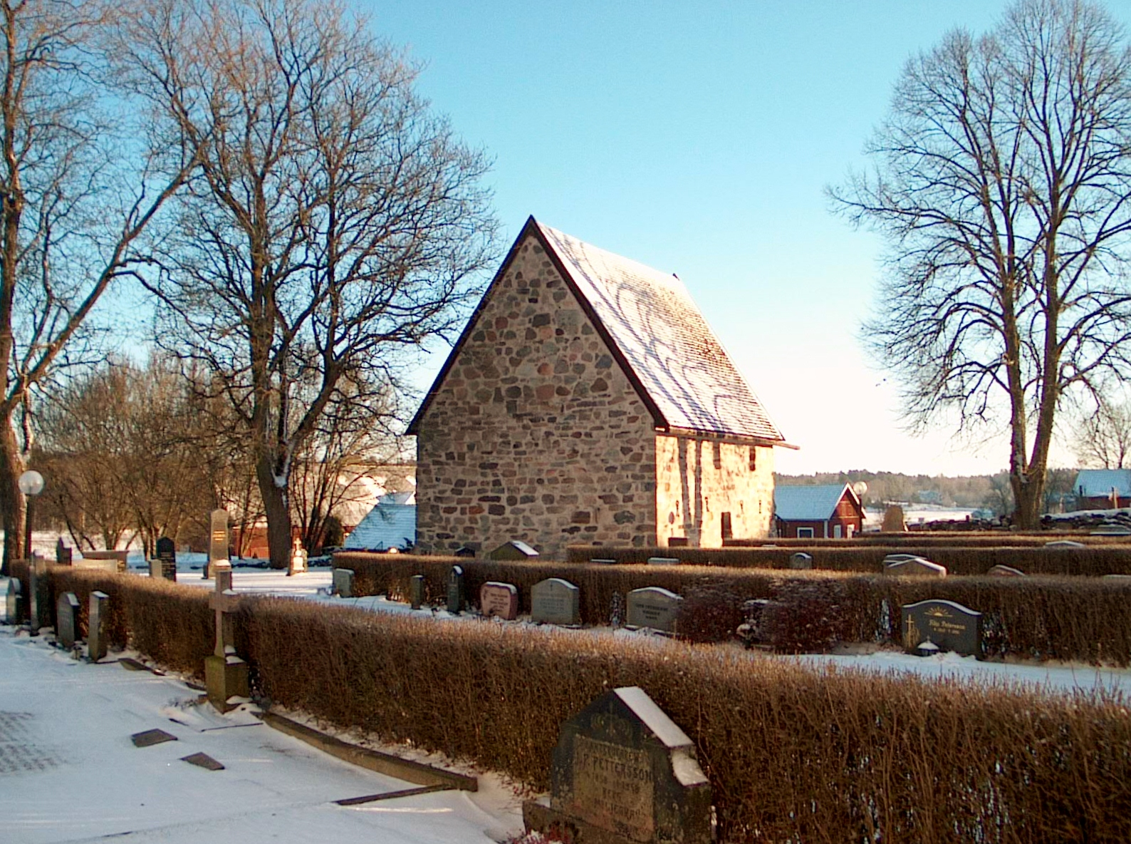 Alseda sommarkyrka